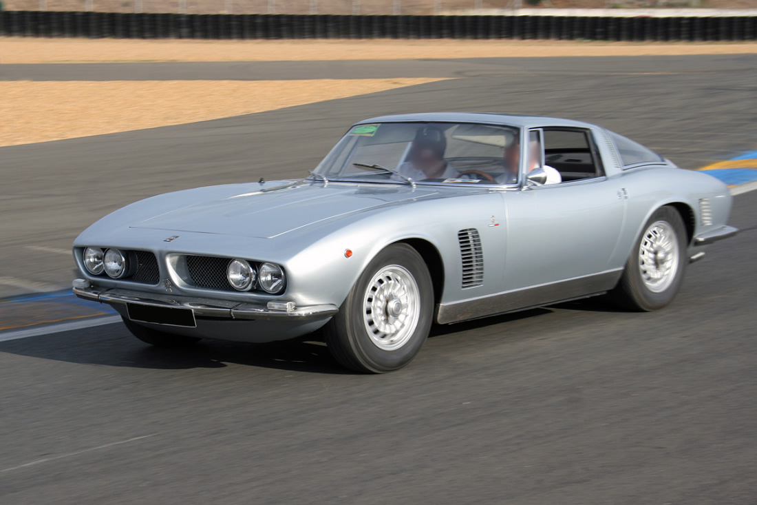 ISO GRIFO Le Mans classic